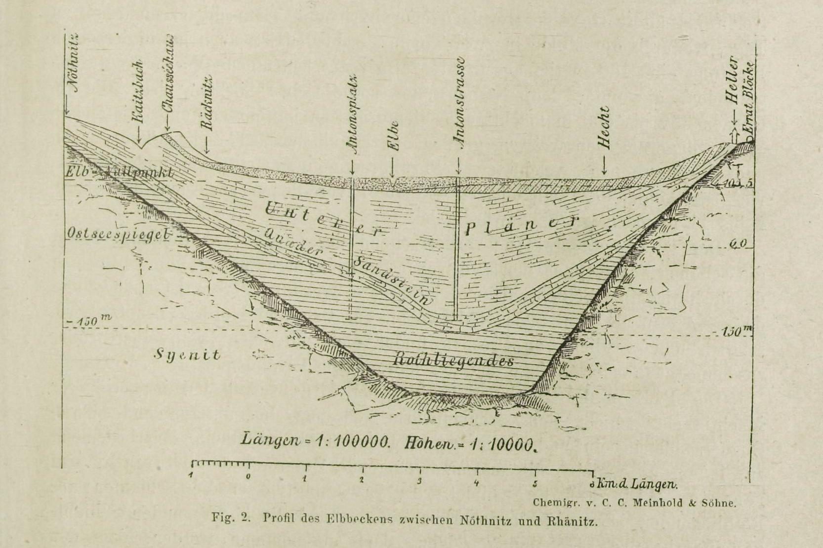 siehe Bildtext aus: Die Bauten, technischen und industriellen Anlagen von Dresden. Herausgegeben vom Sächs. Ingenieur- und Architekten-Verein und vom Dresdener Architekten-Verein. Meinhold, Dresden 1878